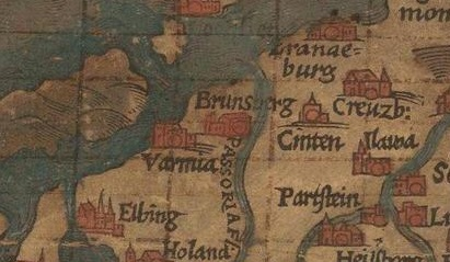 Frombork (Varmia) i Braniewo (Brunsberg) na mapie Polski z 1562 roku